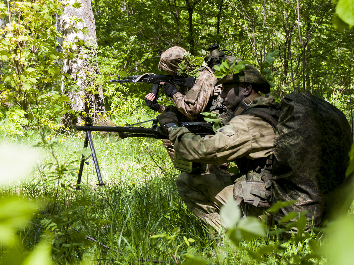 Тренировка разведчиков ЗВО в Тамбове.